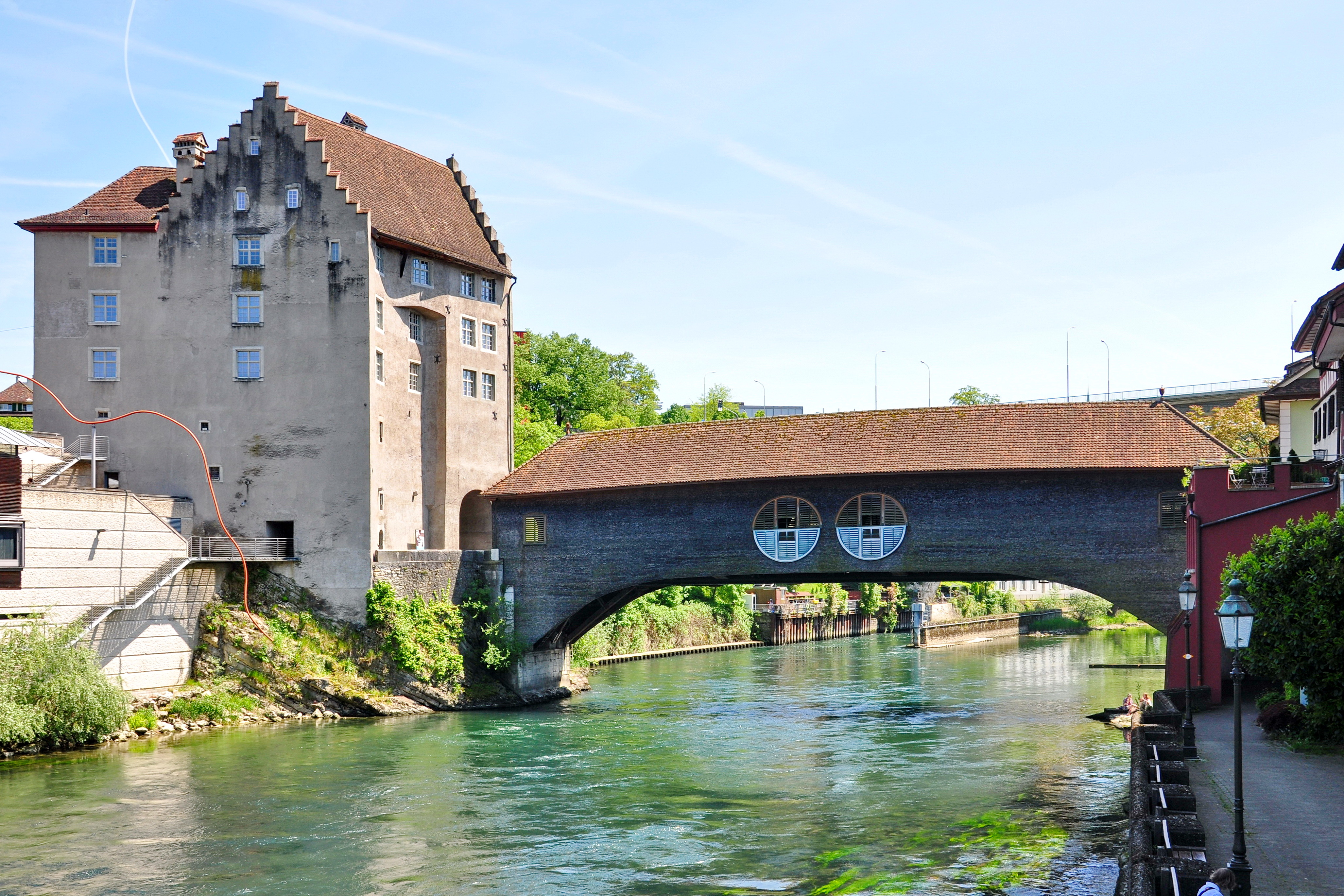 Landvogteischloss in Baden (Switzerland)